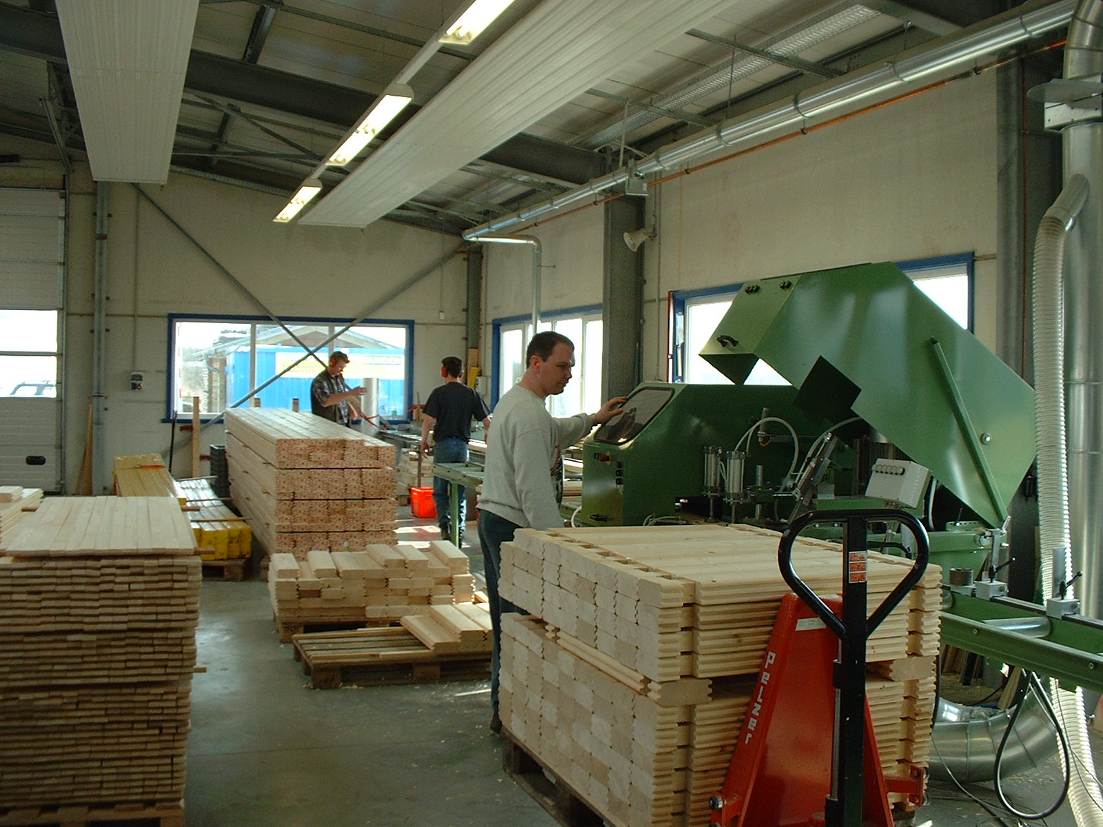 Fräsen und Schneiden Blockbohlensaunabau